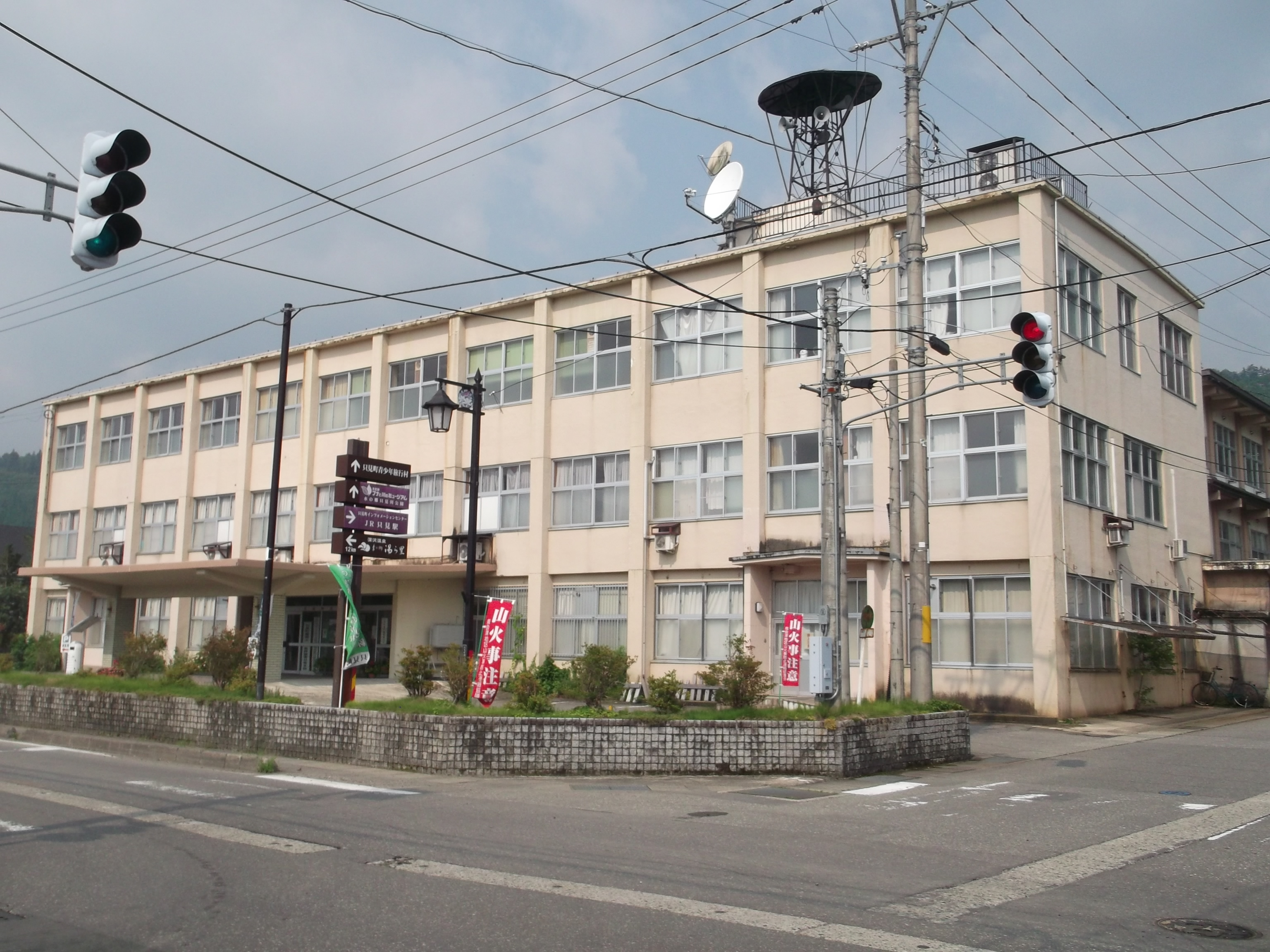 福島県南会津郡只見町役場